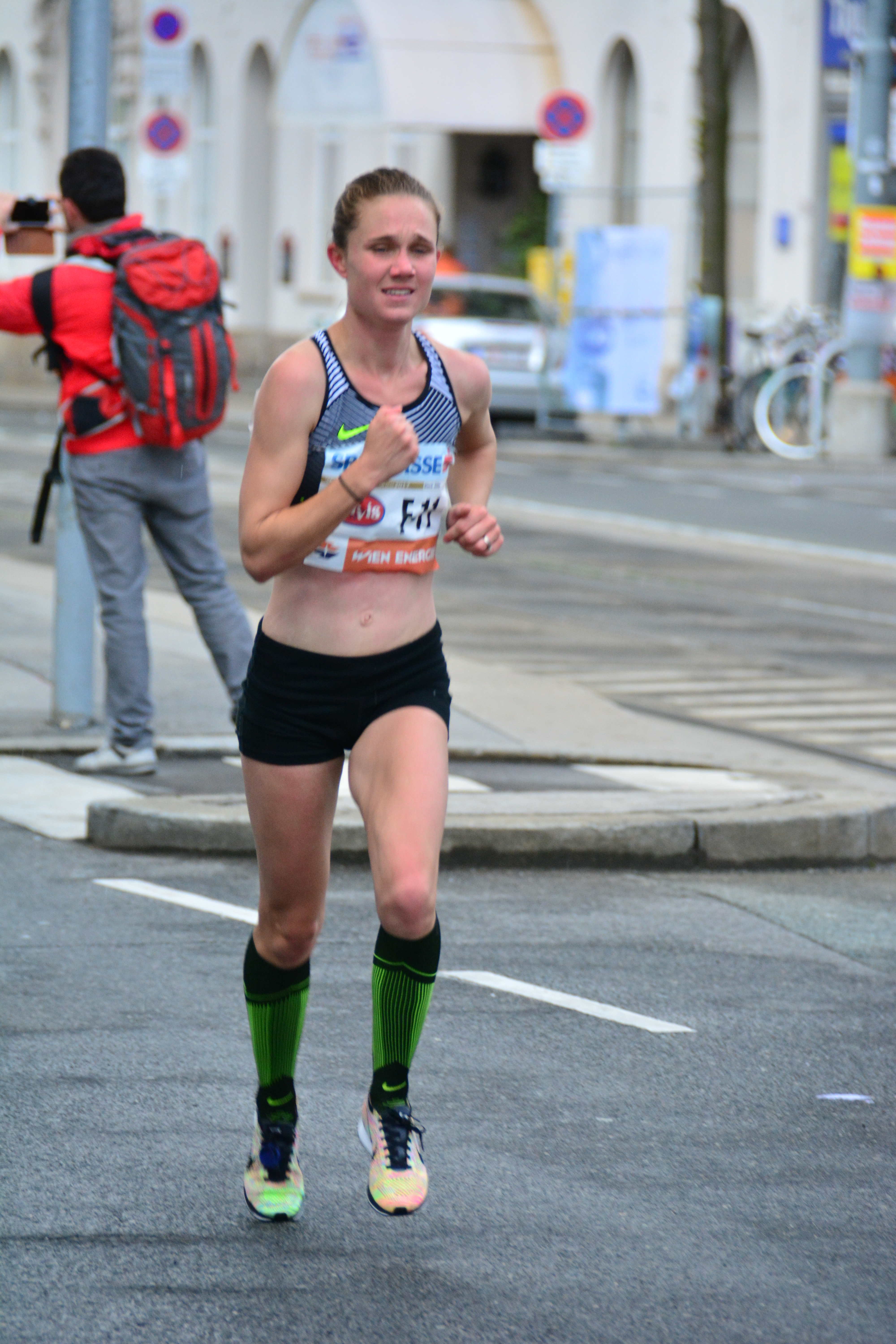 Beim Vienna City Marathon 2017 am 23. April 2017